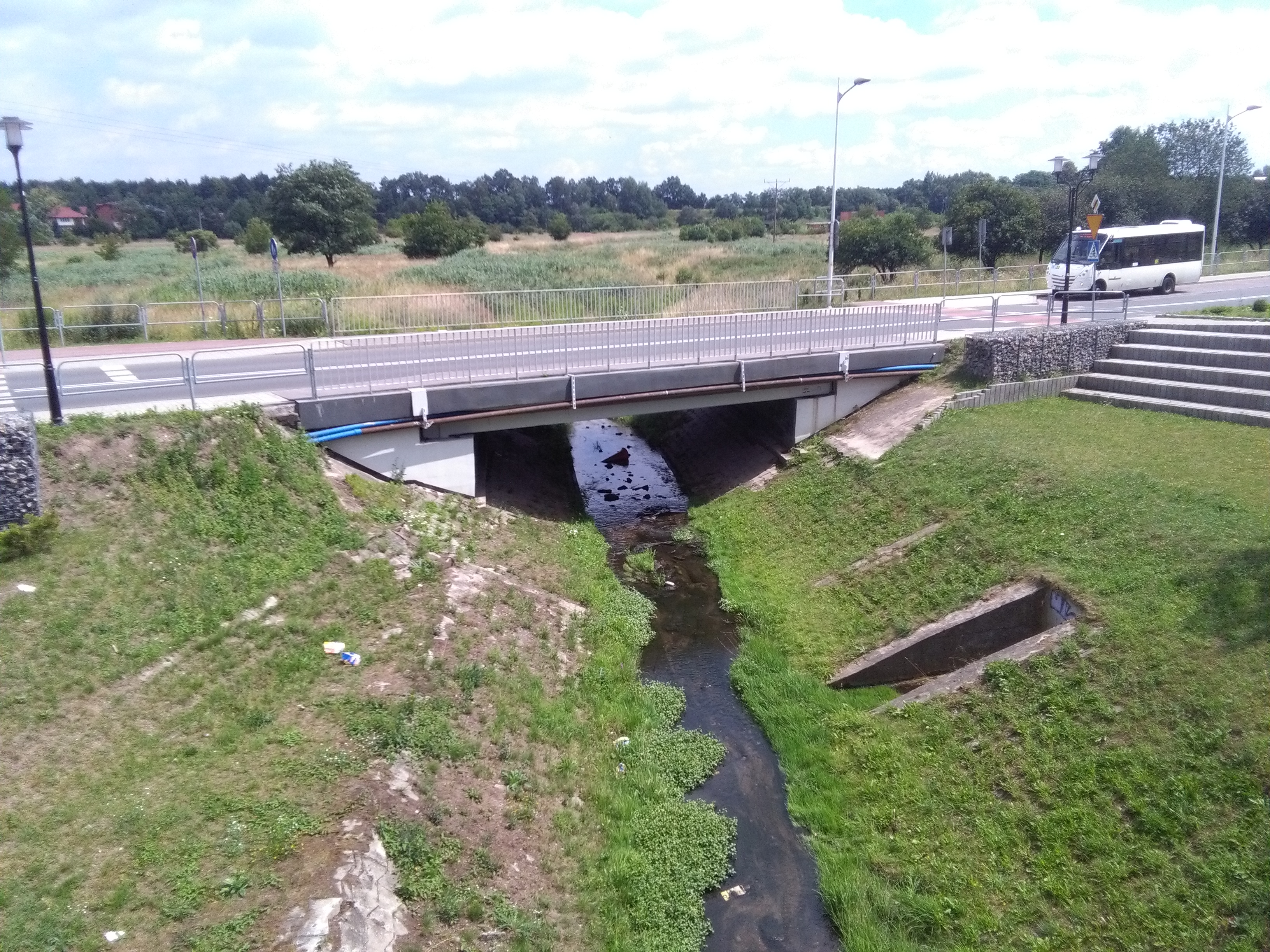 Widok z Zabytkowego Mostu nad rzeką Mleczną w Katowicach - Podlesiu.